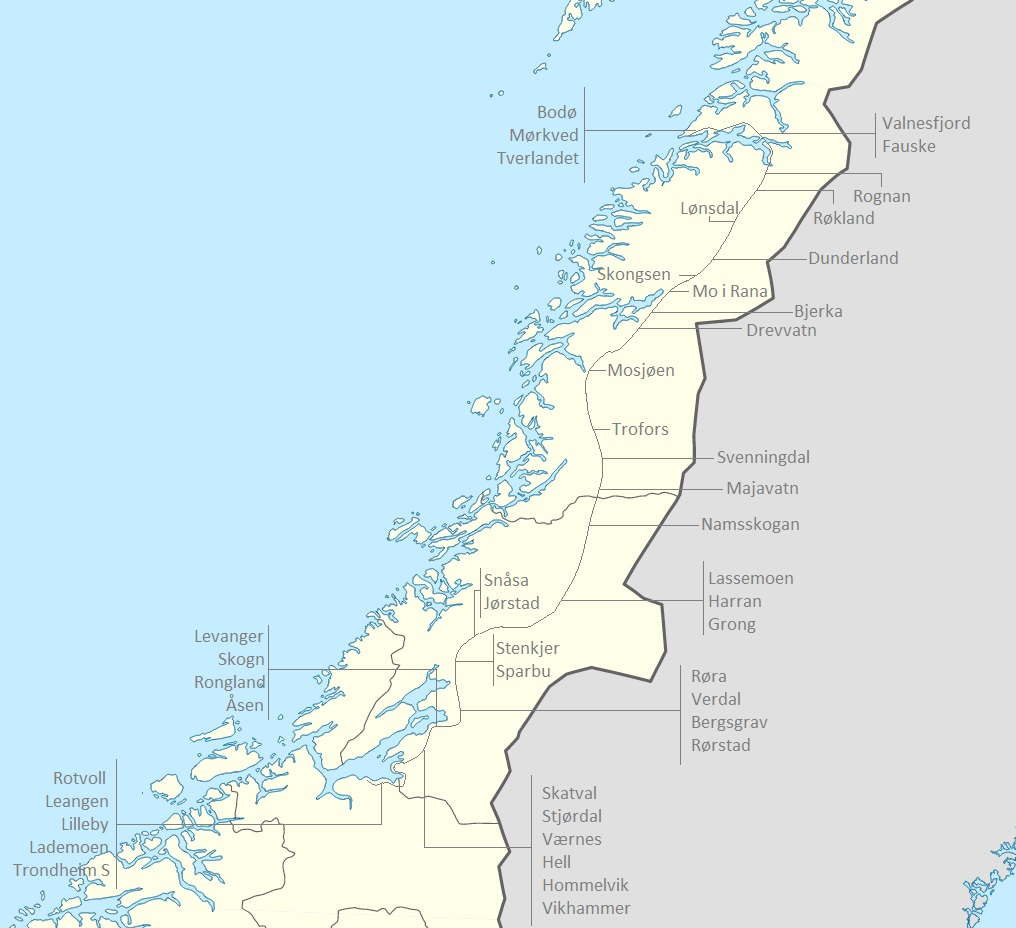 Linjekart over Nordlandsbanen, som går mellom Bodø og Trondheim S. Kartet er opprinnelig hentet fra (CC-BY-SA)